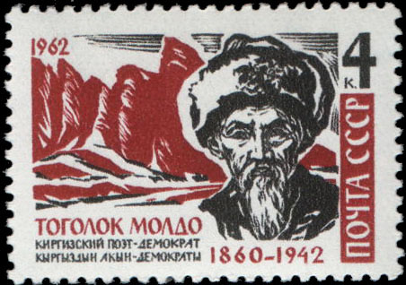 Почтовая марка СССР - Тоголок Молдо